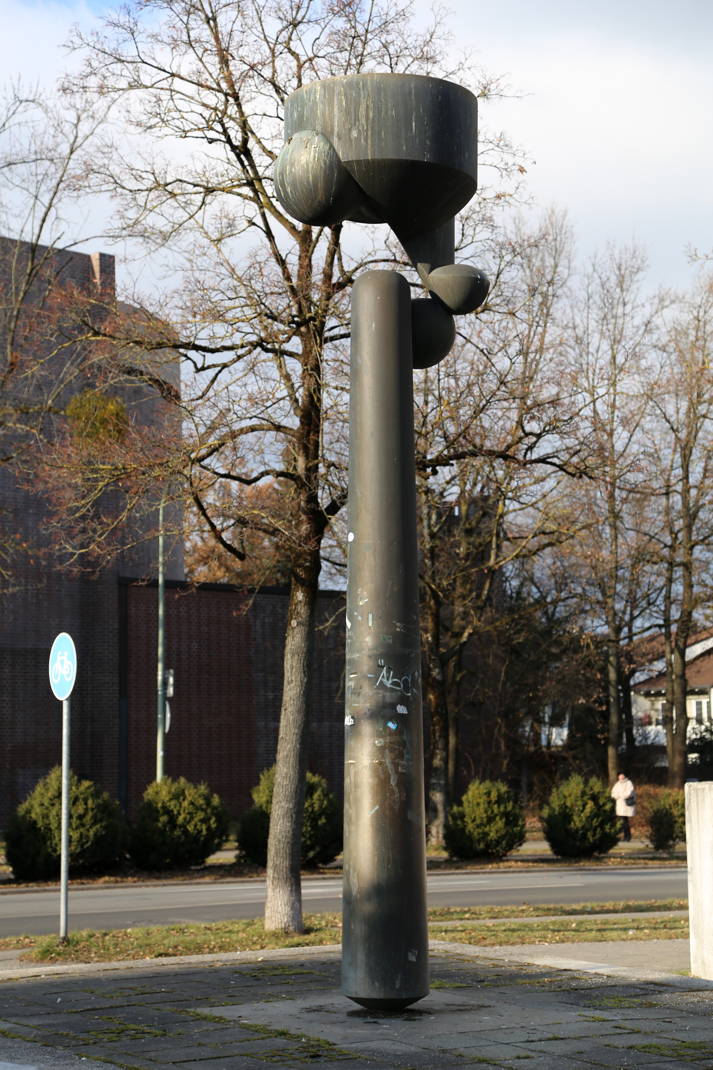 Fritz Koenig: Große Kore III (1972-75), Bronze, 370 cm hoch, Gymnasium Fürstenried West, München